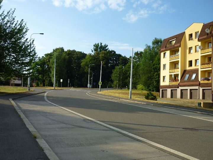 Pohled na nedostavěnou trolejbusovou dráhu a zastávku.